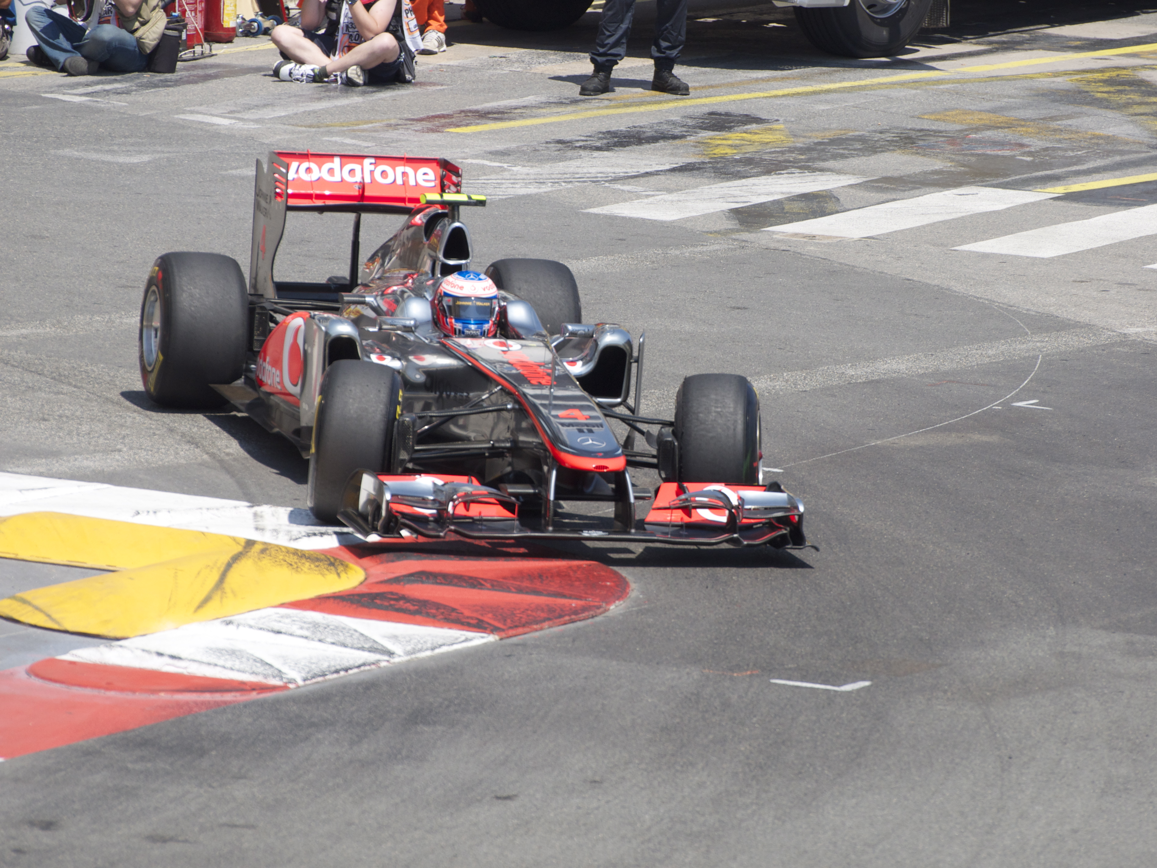 2011 Monaco GP